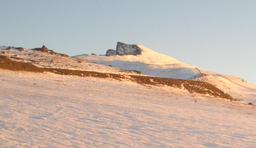 Pico Veleta. Foto tomada desde la Hoya de la Mora.